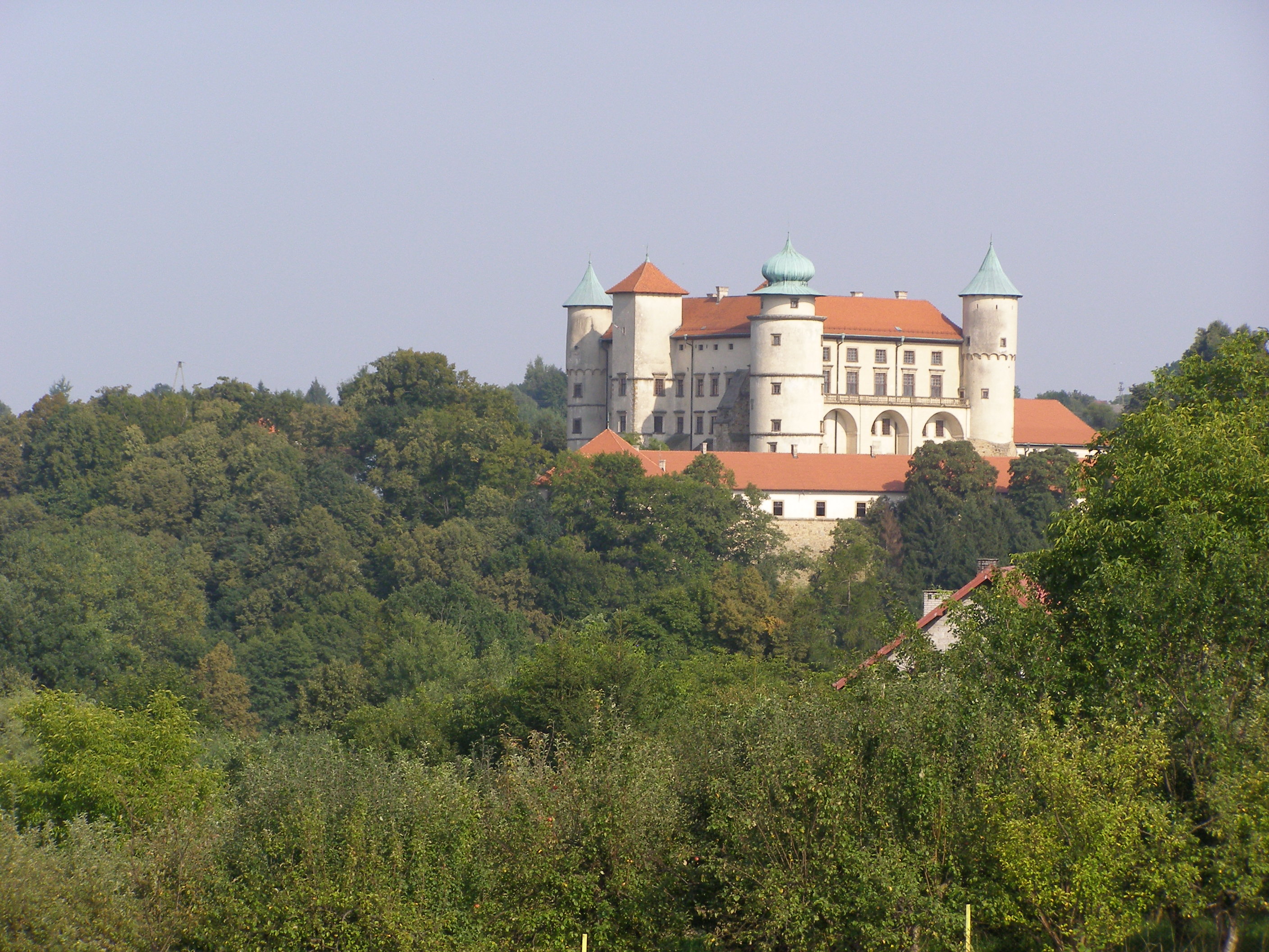 Nowy Wiśnicz - zamek Lubomirskich, widok z drogi na Bochnię